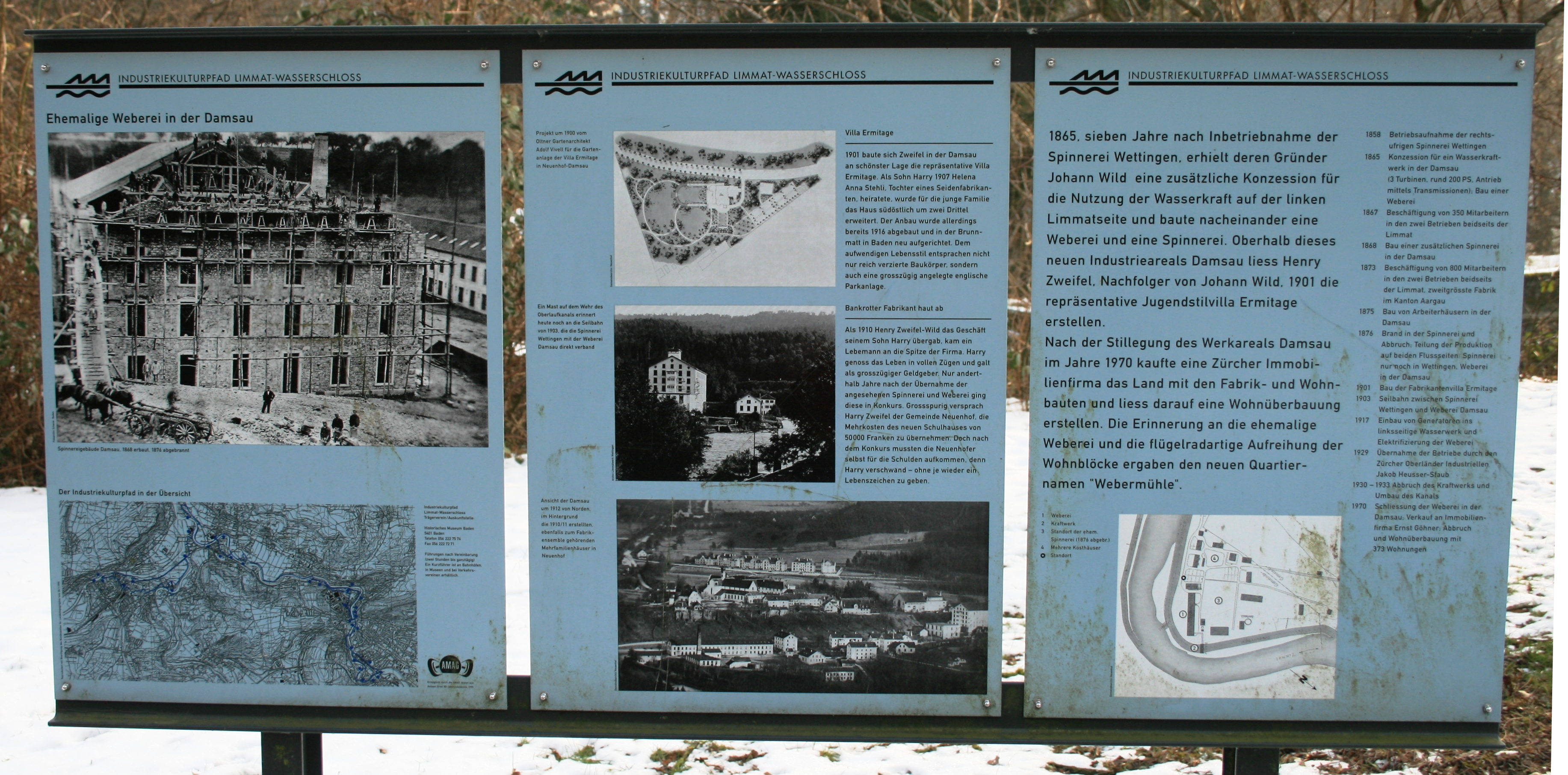 Infotafel des industriekulturpfads über die ehemalige Weberei in der Damsau (Gem. Neuenhof)